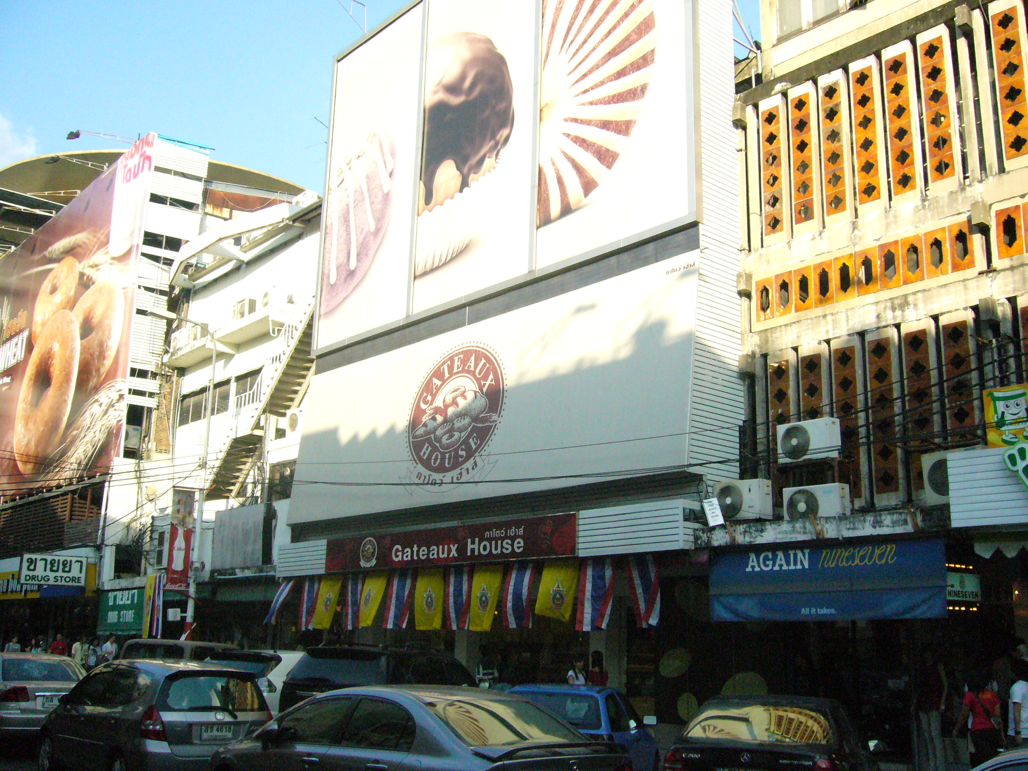 Gateaux House at Siam Square,Bangkok